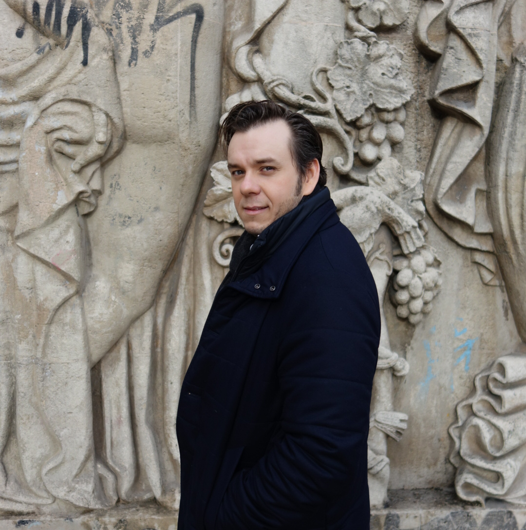 Benjamin Bernheim in Paris